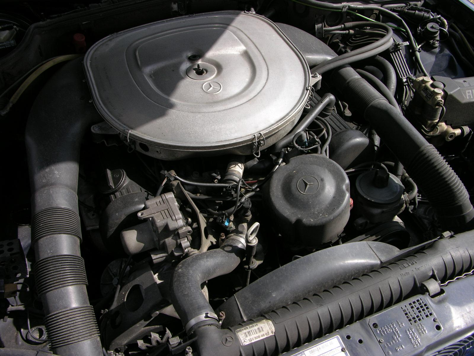 Mercedes Benz 420SEL